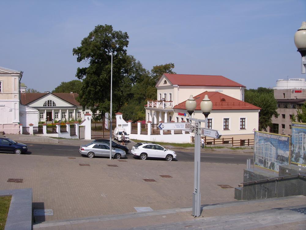 Улица Интернациональная